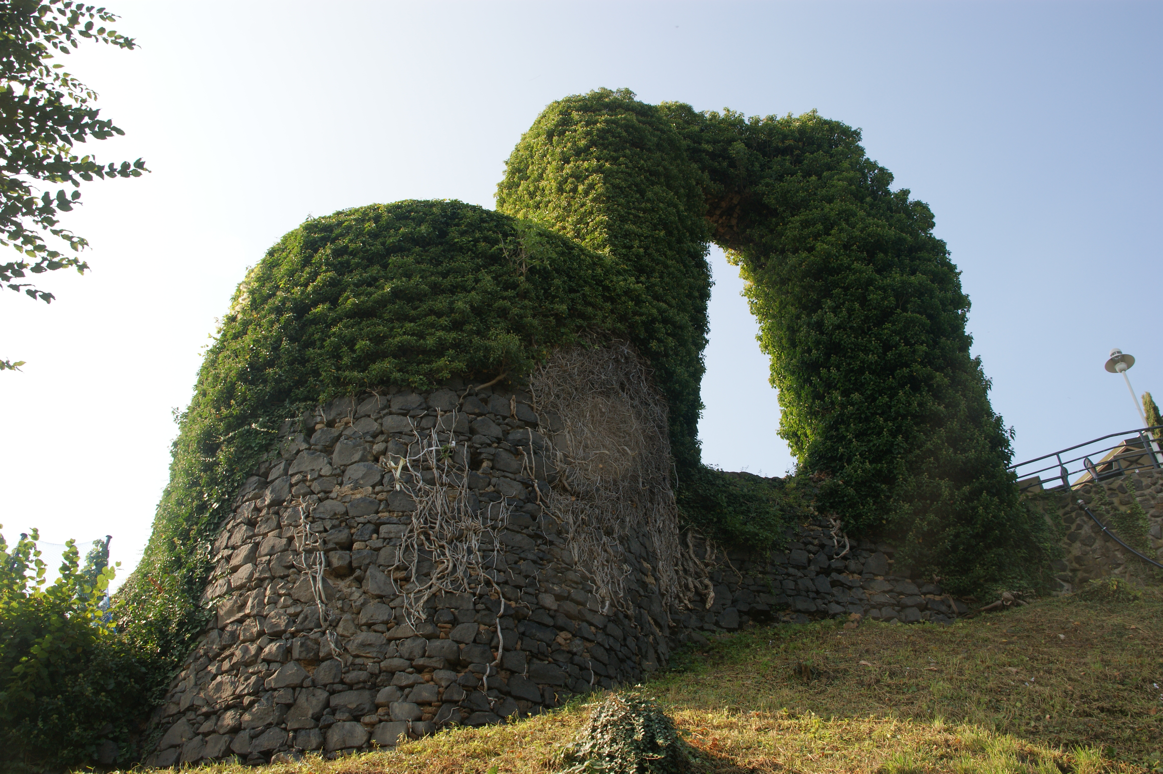 Rolandsbogen in Remagen-Rolandswerth